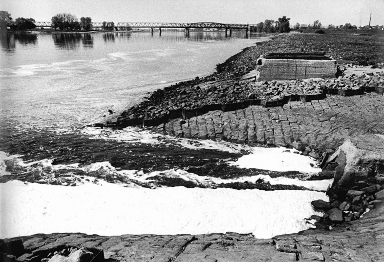 Wittenberge, Abfluss des Papierwerks in die Elbe ADN-Pätzold 2.5.90 Bez.Schwerin-Zellstoffwerk- Weiße Schaumkronen auf der Elbe sind Beleg für die Umweltsünden, die vom Zellstoff- und Zellwollewerk Wittenberge begangen werden. Mit der baldigen Schließung der gesamten Zellglas- und der Drosselung der Zellwollefertigung soll u.a. die Abgasmenge des Betriebes um rund 40 Prozent gesenkt werden. Schnelle Investitionen würden hier umweltfreundlicheres Produzieren ermöglichen und 2.000 Arbeitsplätze sichern helfen. Information added by Wikimedia users.im Hintergrund: Reste der alten vor der neuen Eisenbahnbrücke